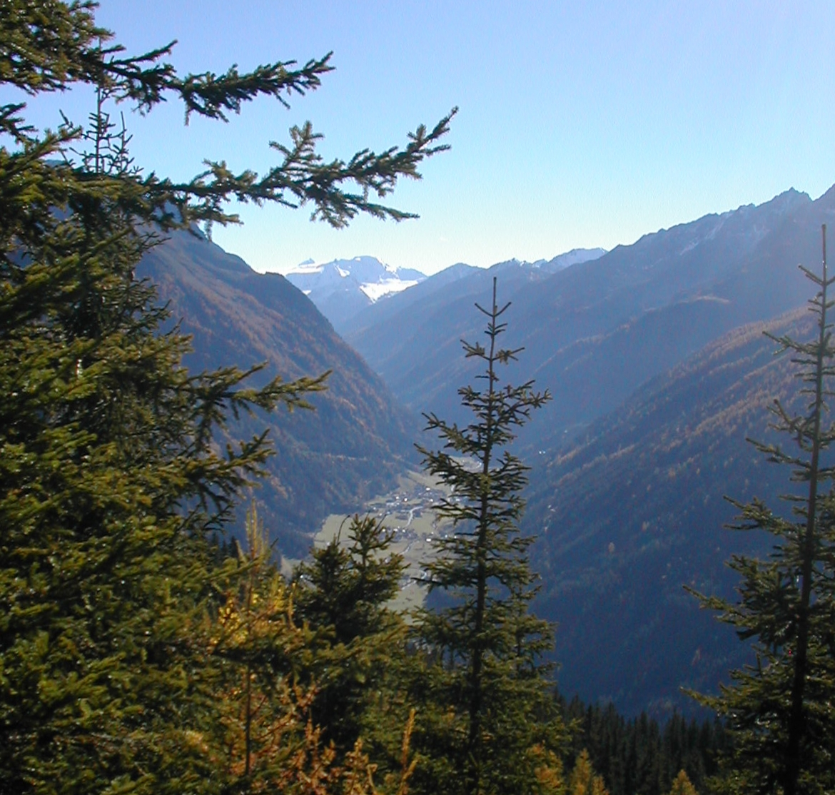 Blick vom Kaunerberg (Gemeinde Kaunertal) ins Kaunertal. Weißseespitze im Hintergrund.